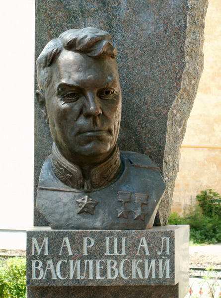 Бюст Маршалу Василевскому в г. Вичуге. Открыт 8 мая 2006 г. Скульпторы А.А. Смирнов, С.Ю. Бычков, архитектор И.А. Василевский